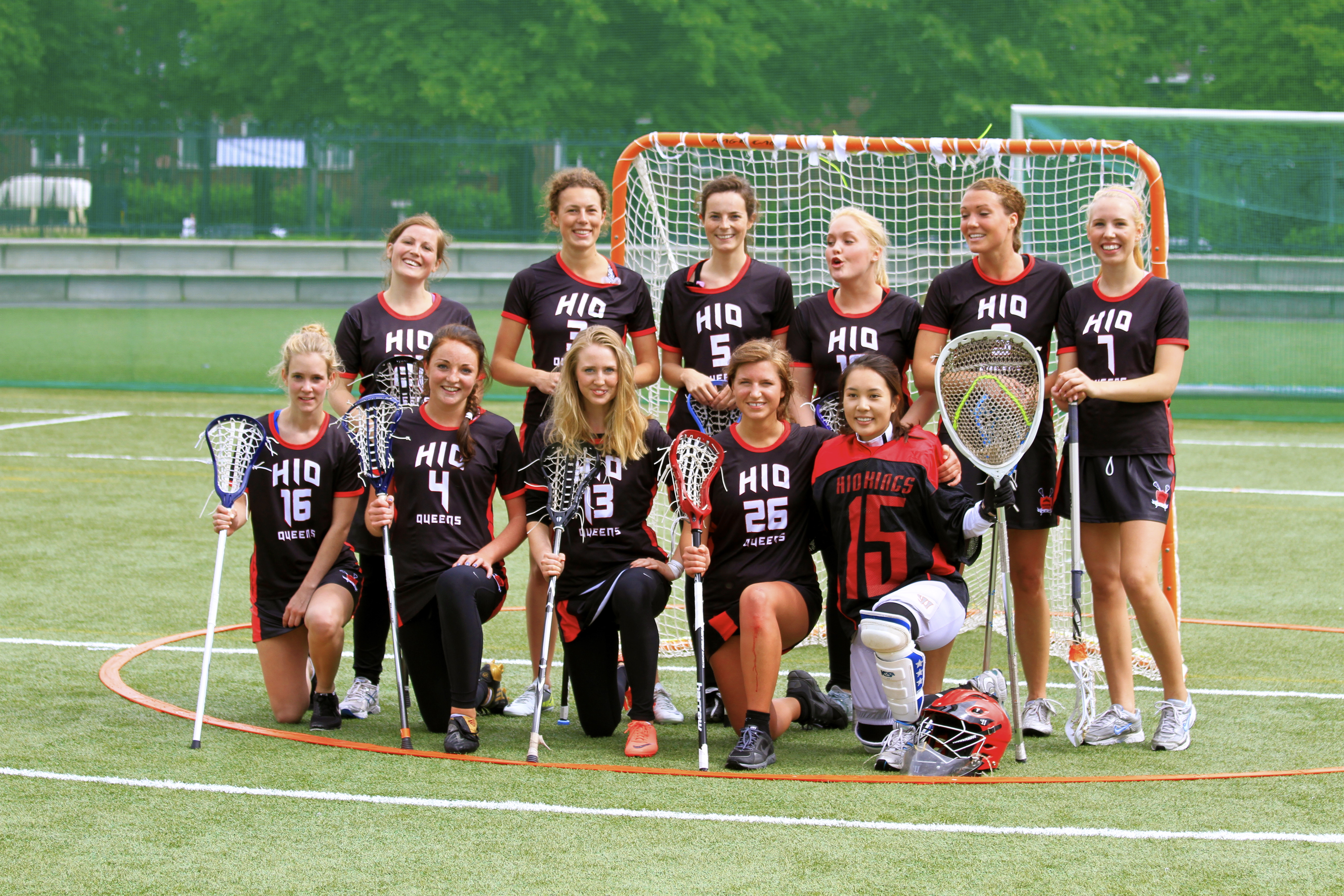 HiOA Queens Lacrosse - 2012, Øvest.Katie Mann, Berit Dalnoki, Ingrid Sterud, Malin Stavrum, Elyse Magnus, Mimi Wikant Neders.v: Birthe Lubberich, Nikoline Torlei, Victoria Fife, Ingvild Ellingsen, Victoria Huynh